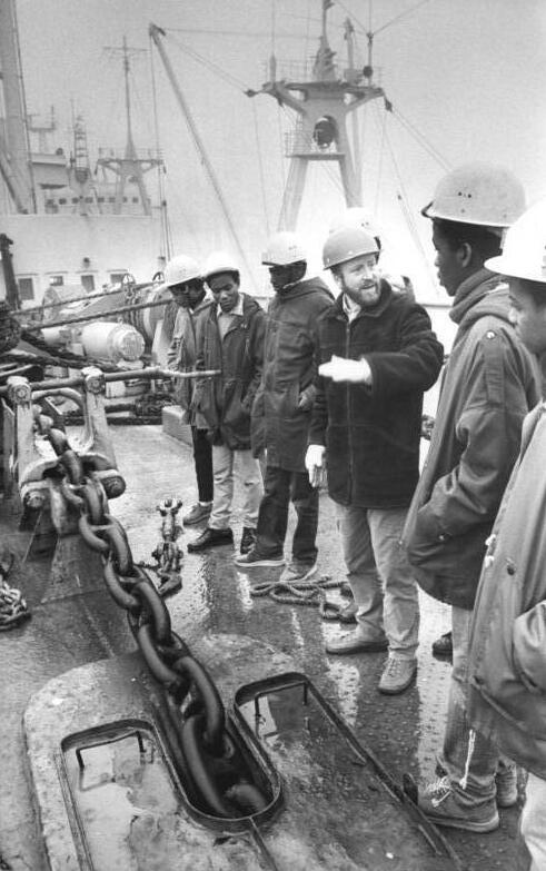 Rostock, Auszubildende aus Mosambik ADN-ZB Sindermann 25.2.87-A-Rostock: Fischereiausbildung-An der Betriebsakademie des VEB Fischfang Rostock werden 13 junge Fischer aus Mocambique zu Meistern für Schiffsführung und Schiffsbetriebstechnik qualifiziert. Oberinspektor Wolfgang langsehwager bei der praktischen Ausbildung an Bord des Transport- und Verarbeitungsschiffes "Junge Welt". -siehe auch Nr. 1987-0225-26- und 27N